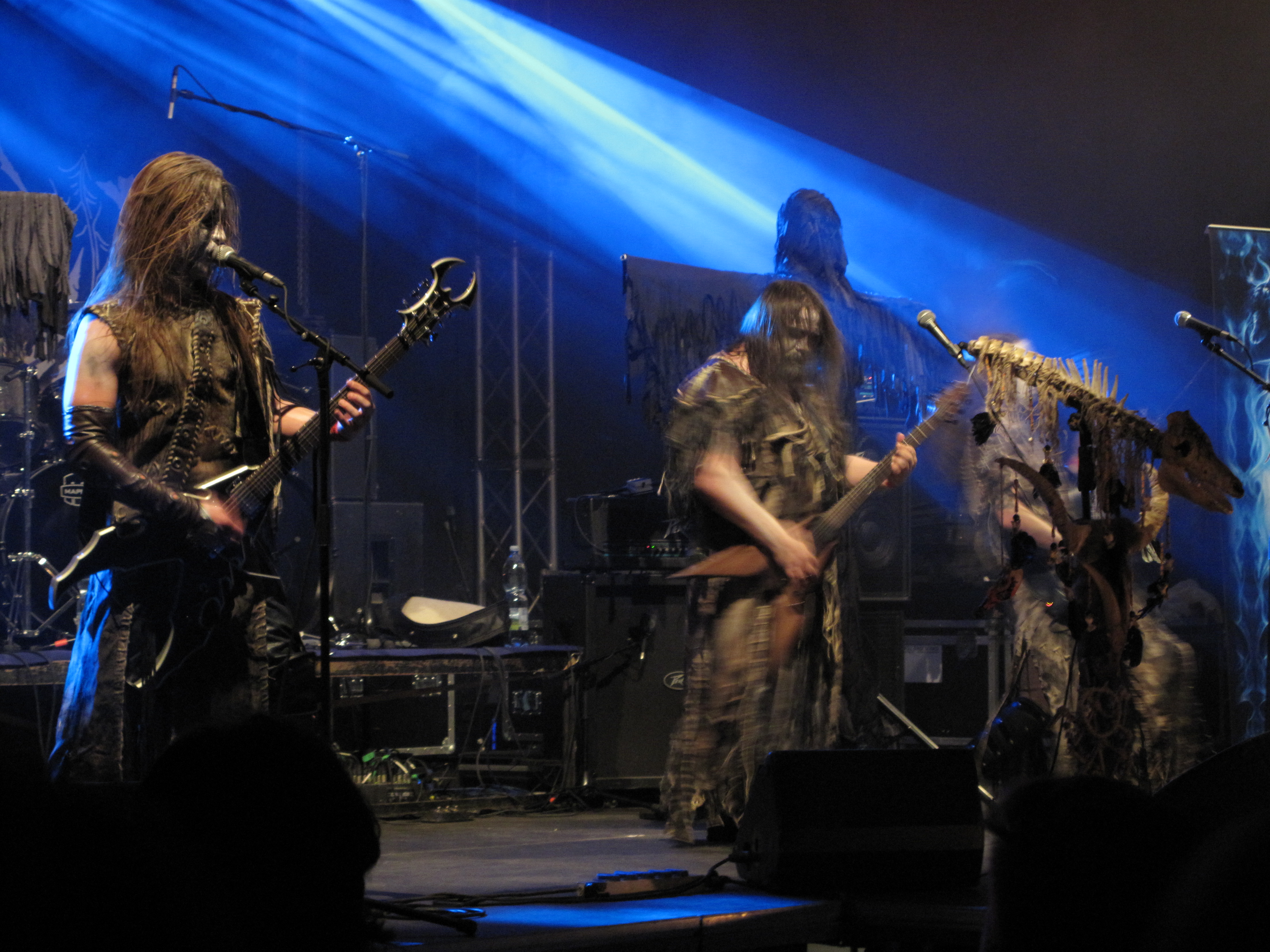 Nokturnal Mortum na festivalu Hell Fast Attack